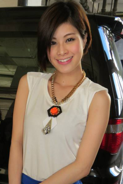 Keeva Mak 麥家瑜在活動「新城勁爆童星歌唱比賽2013＠領匯海選」。